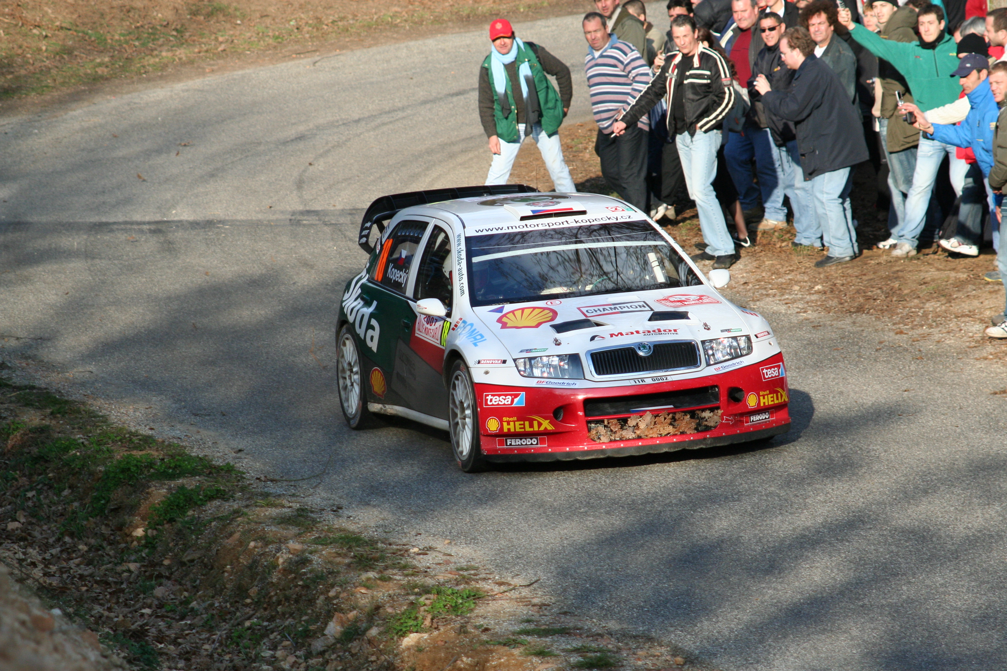 Jan Kopecký podczas Rajdu Monte Carlo 2007